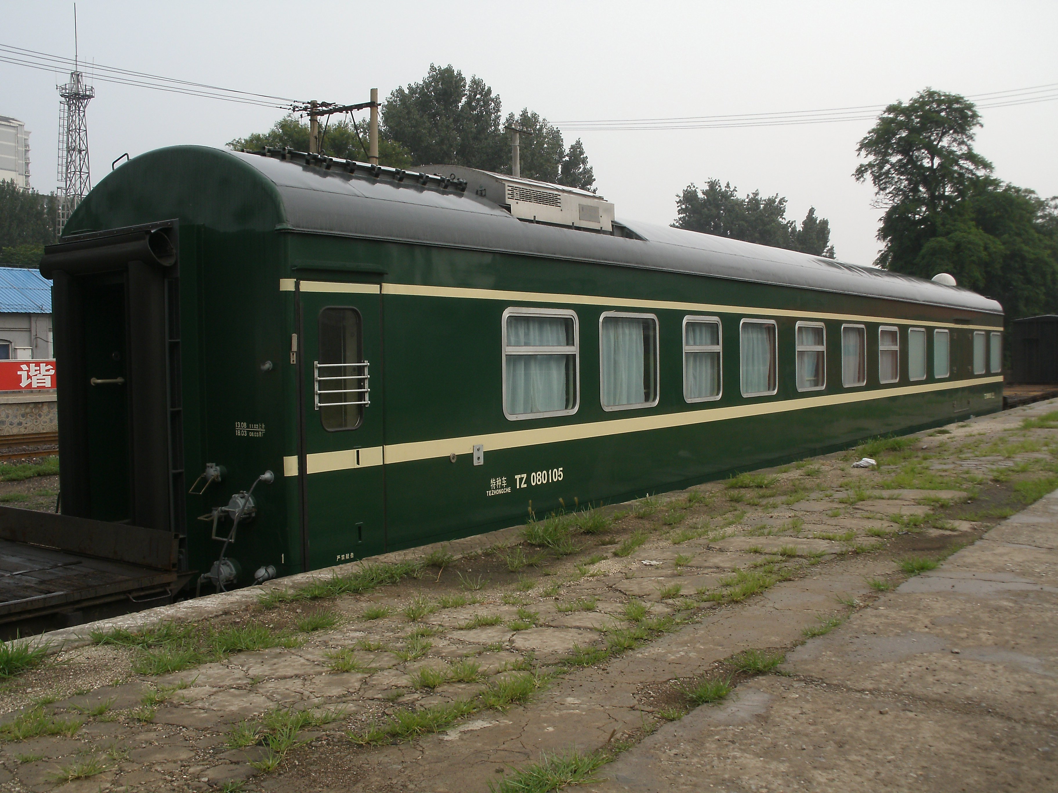 中国铁路客车特种车，于清河站